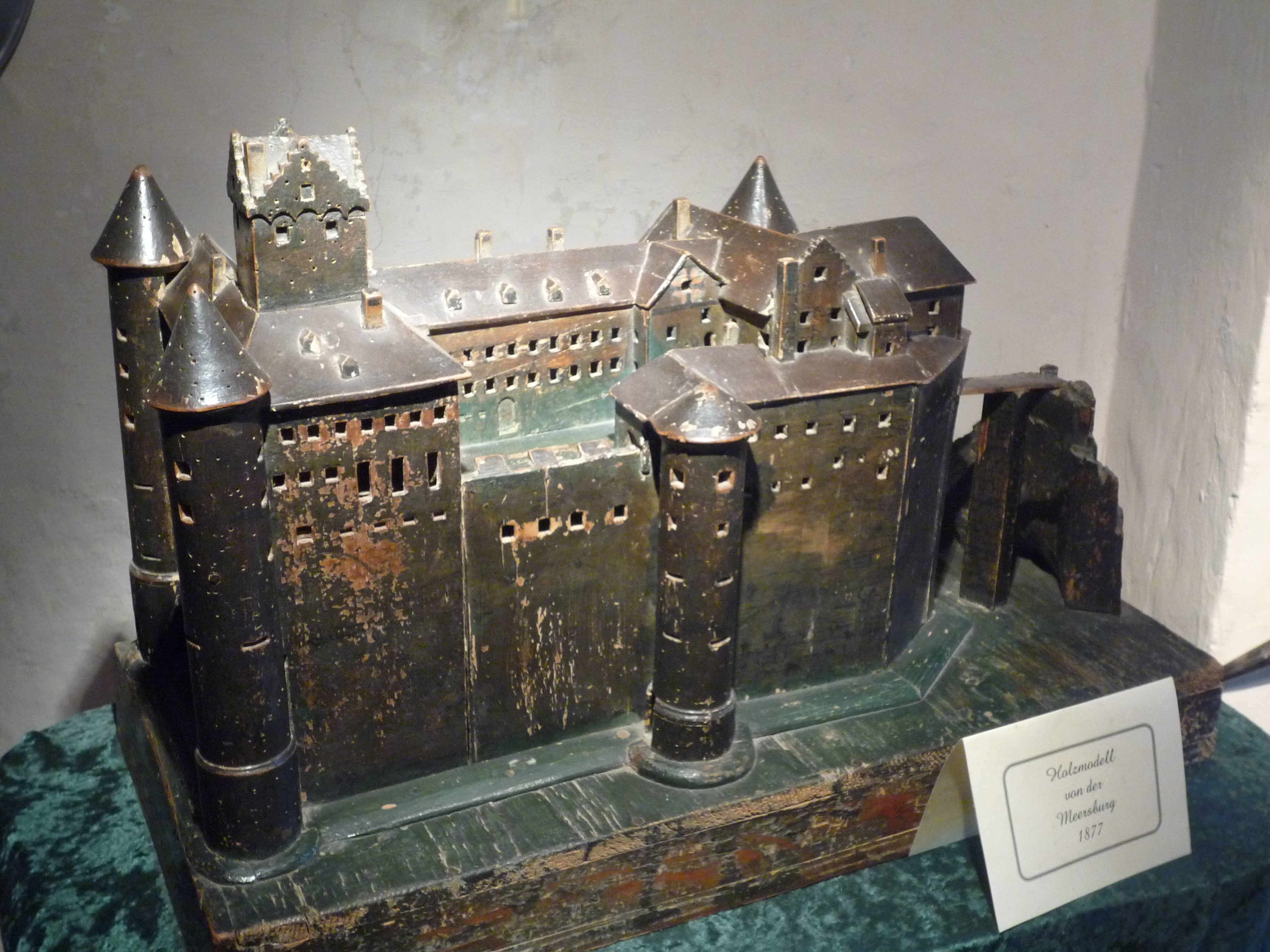 Modell der Meersburg in selbiger